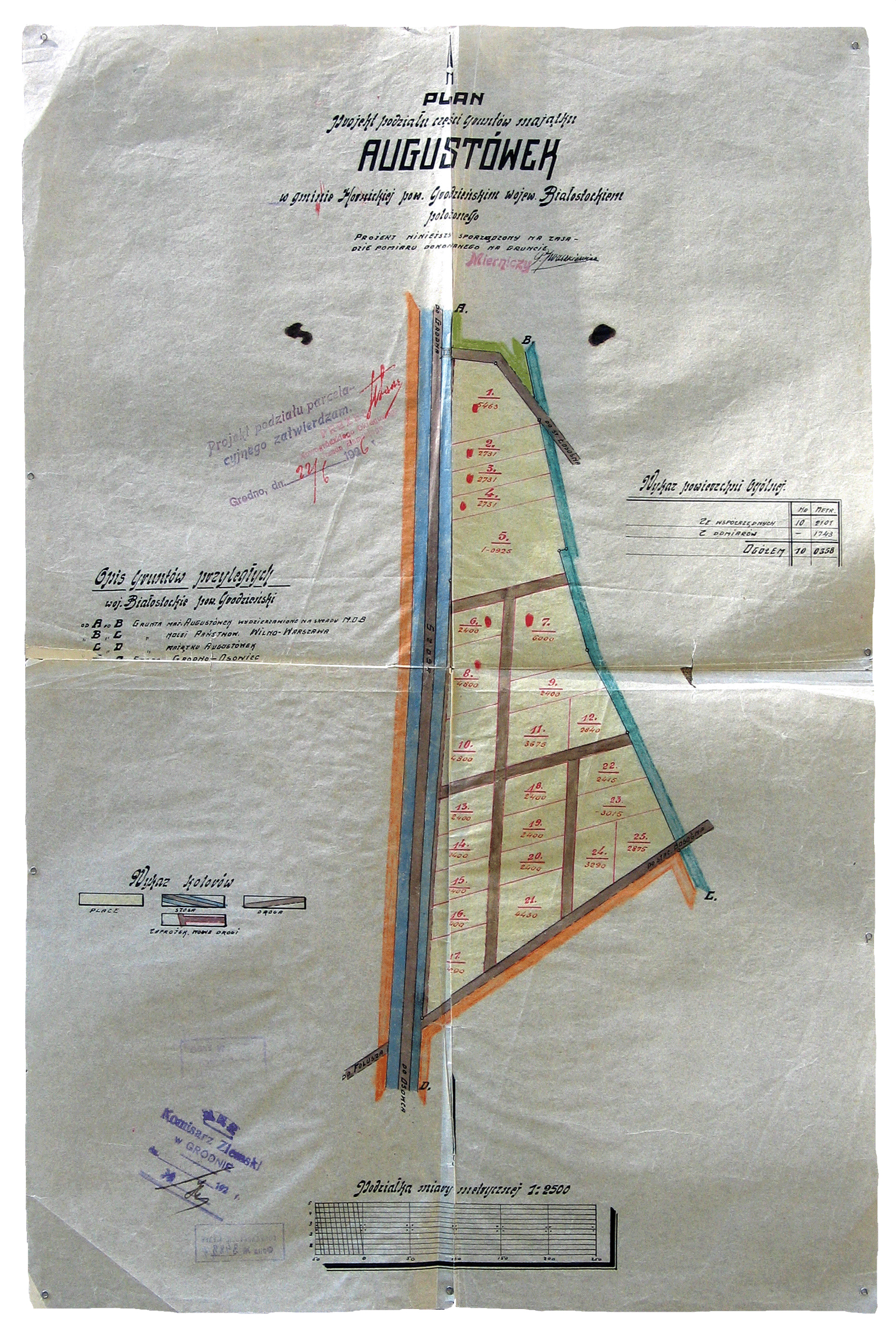 Беларуская (тарашкевіца): Горадня (Horadnia), Аўгустовак (Aŭgustovak). Плян